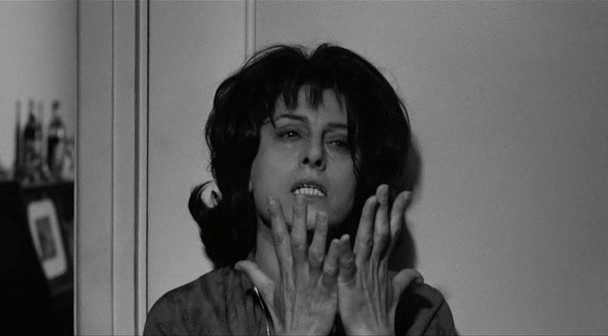 Screenshot del film Mamma Roma (1962) diretto da Pier Paolo Pasolini